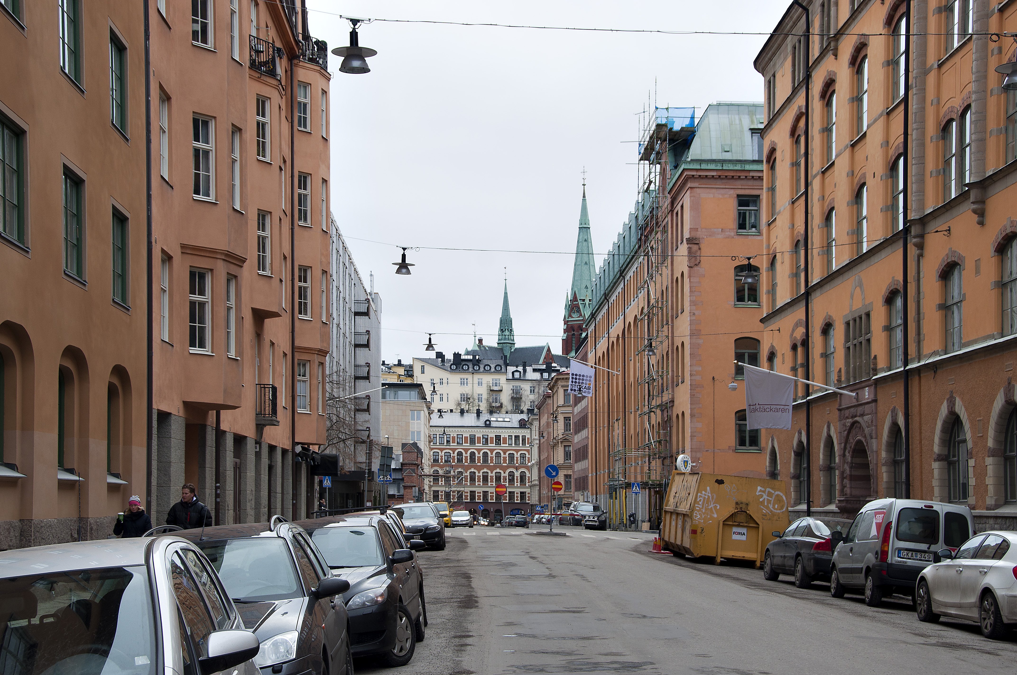 Tulegatan söderut.